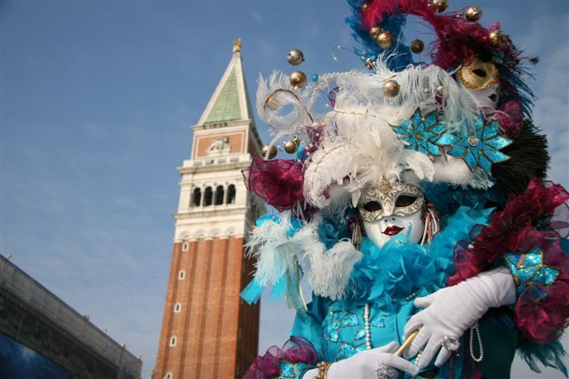 Maschere al Carnevale di Venezia 2008